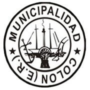 Logo Colón, Entre Rios.